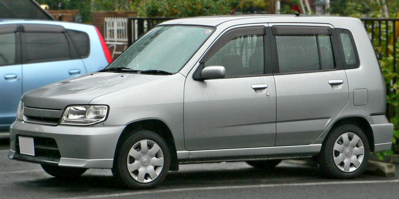 1st generation Nissan Cube (2000 - 2002)